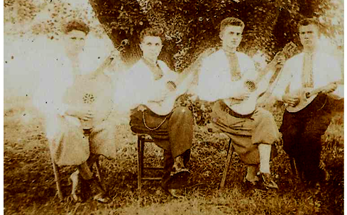 Струнний квартет села Зубкова 1942 рік